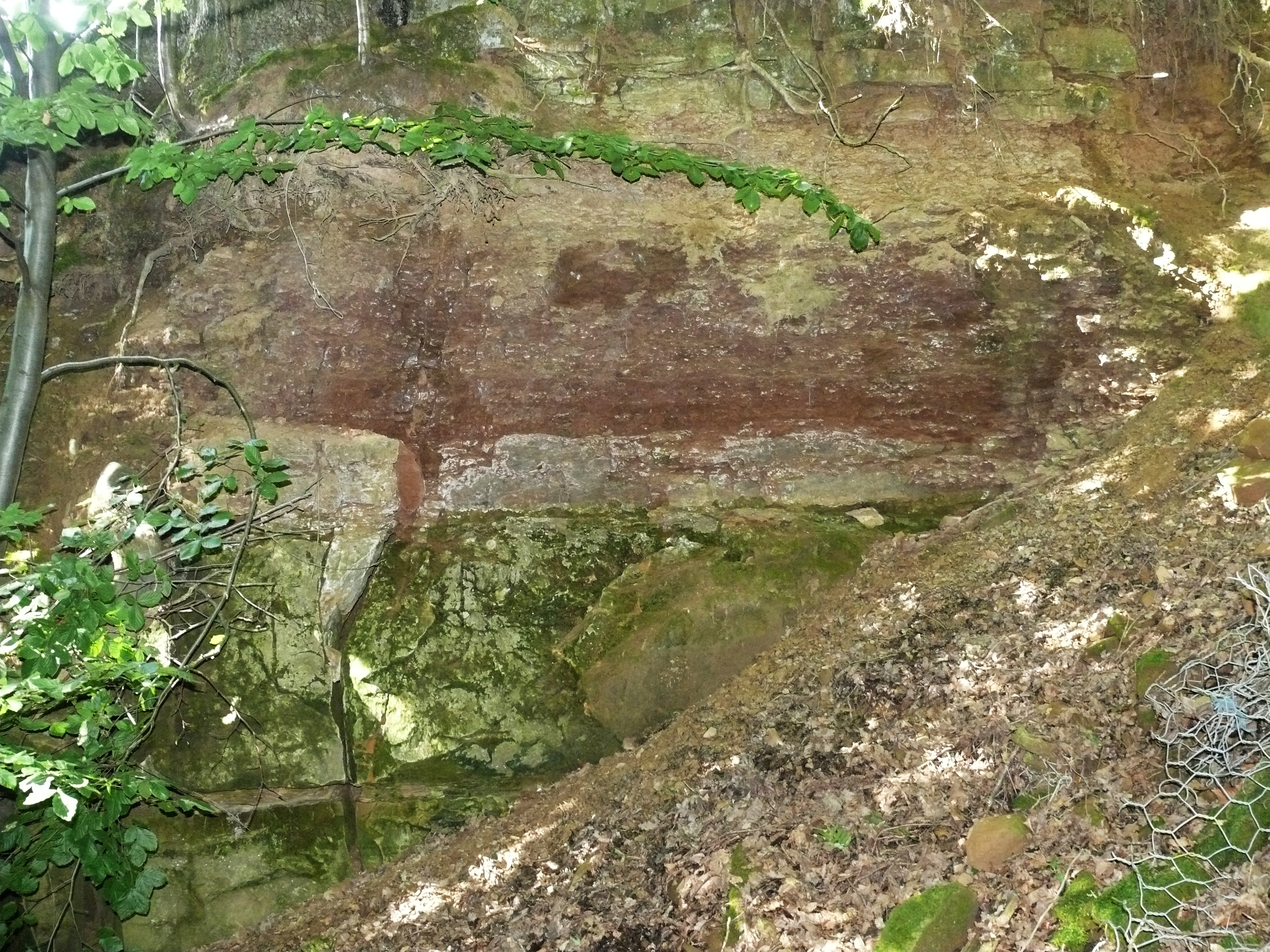 Eisensandstein: --Personatensamdstein --Unteres Flöz --Unterer Donzdorfer Sandstein Alter Steinbruch bei Lauchheim